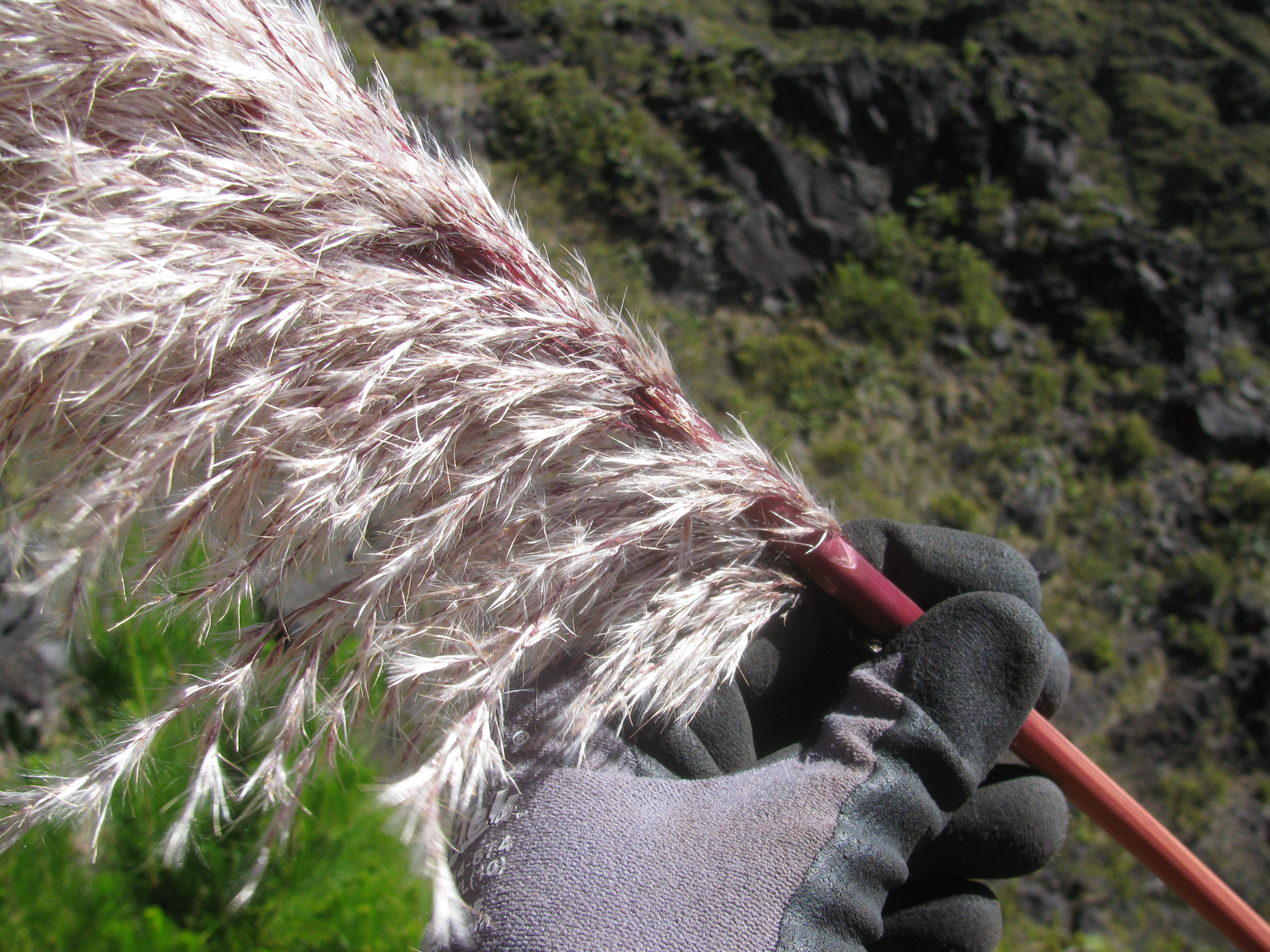 Cortaderia jubata (Pampas grass) Seedhead at Halemauu Trail Haleakala National Park, Maui, Hawaii. October 18, 2012 #121018-1026 Image Use Policy